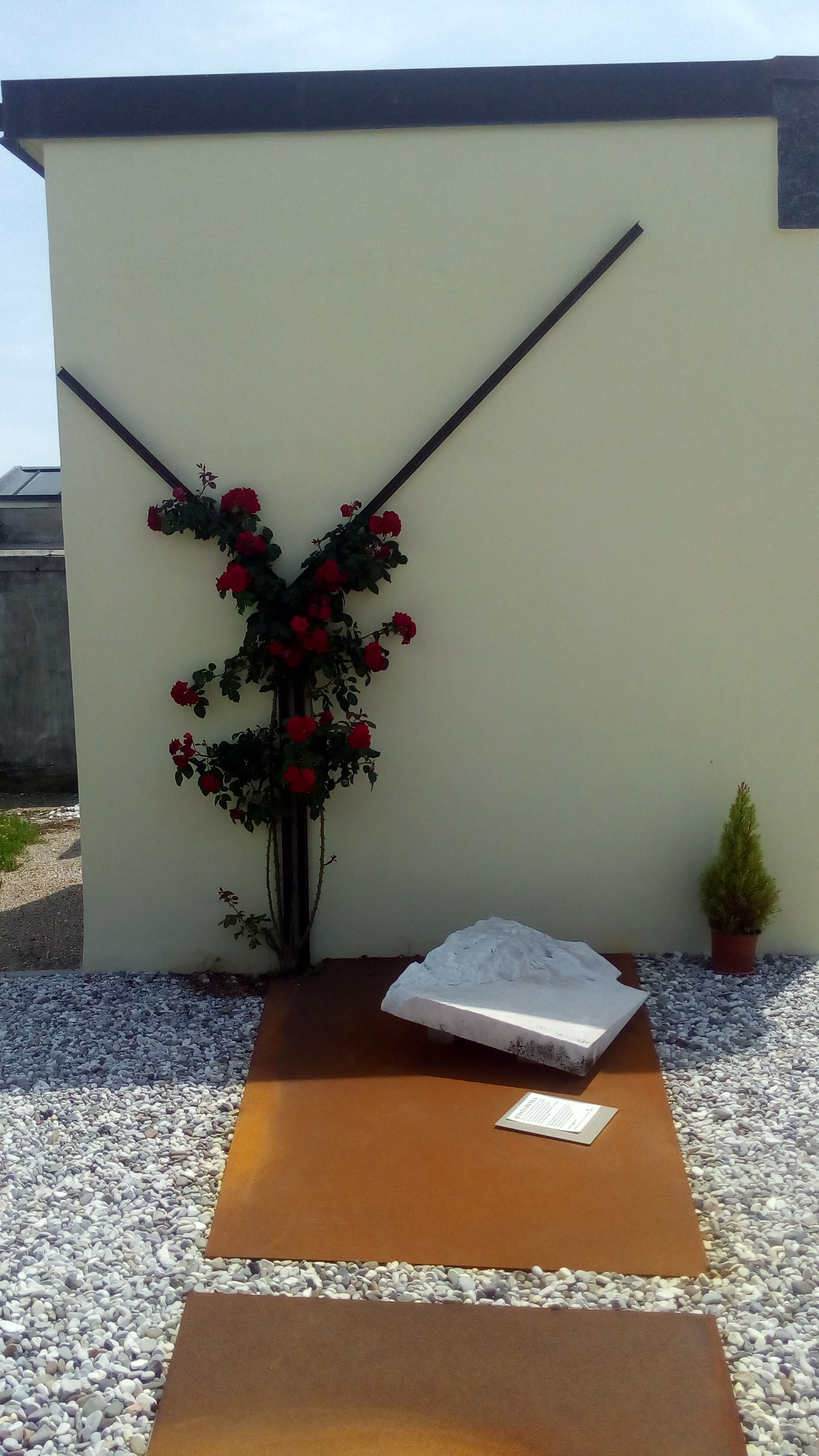 pietra